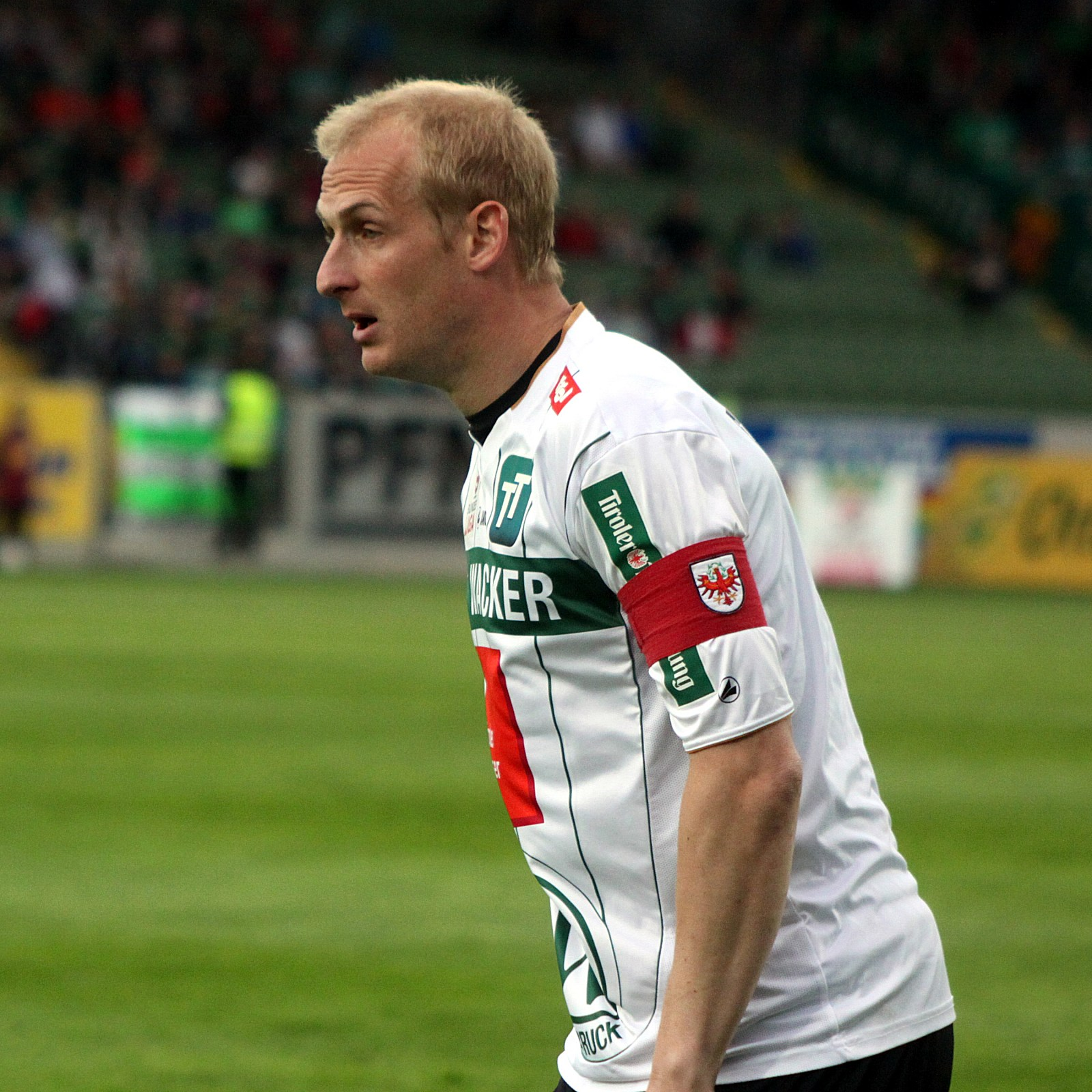 Meisterschaftsspiel der österreichischen Bundesliga: SV Mattersburg gegen FC Wacker Innsbruck am 7. April 2013 (0:0)] im Mattersburger Pappelstadion.] - Das Foto zeigt Martin Švejnoha (FC Wacker Innsbruck). Object location47° 44′ 21.66″ N, 16° 24′ 23.13″ E